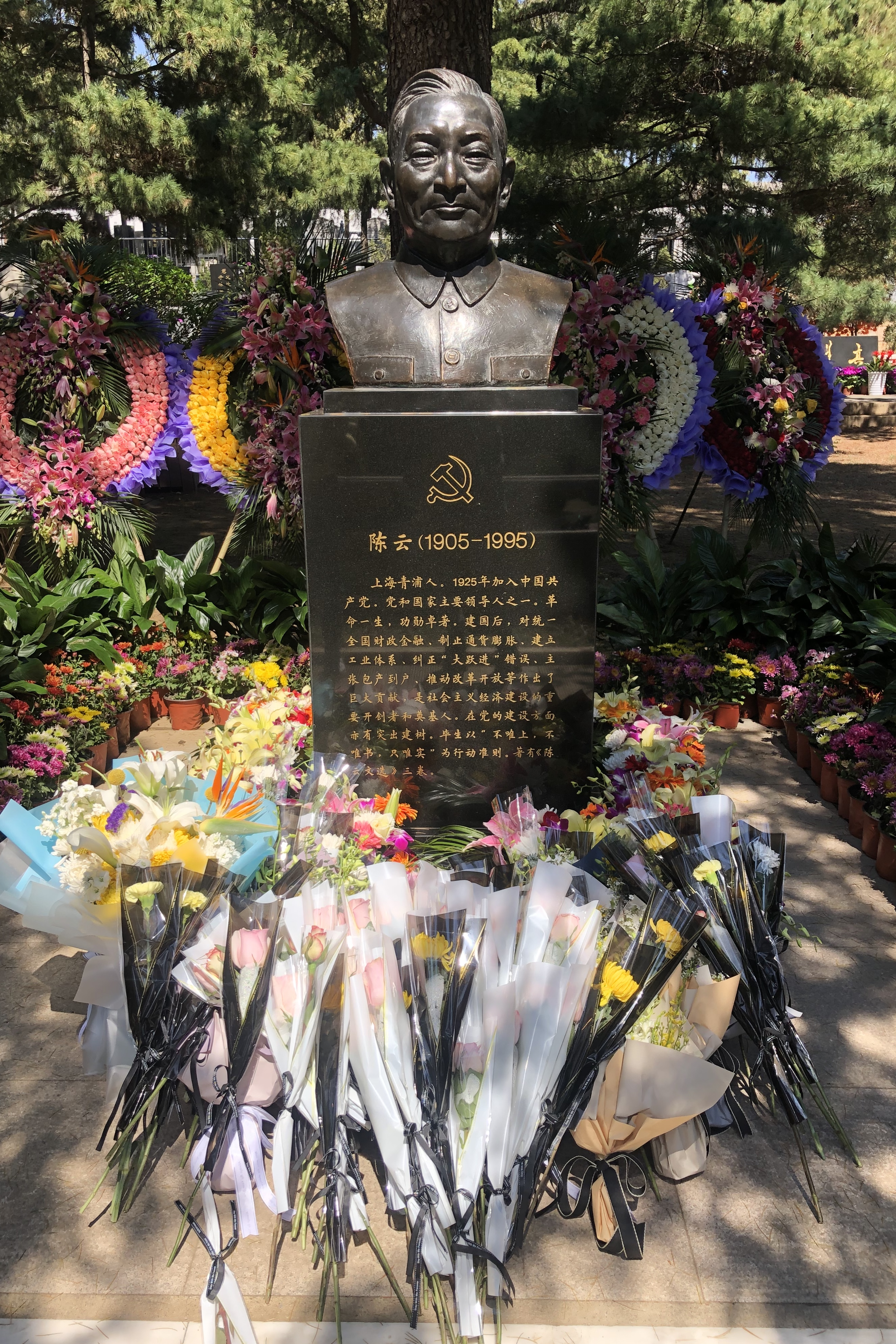 陈云墓地，位于北京八宝山革命公墓内。陈云为中华人民共和国第一代和第二代领导团体核心成员之一，主管经济部门。